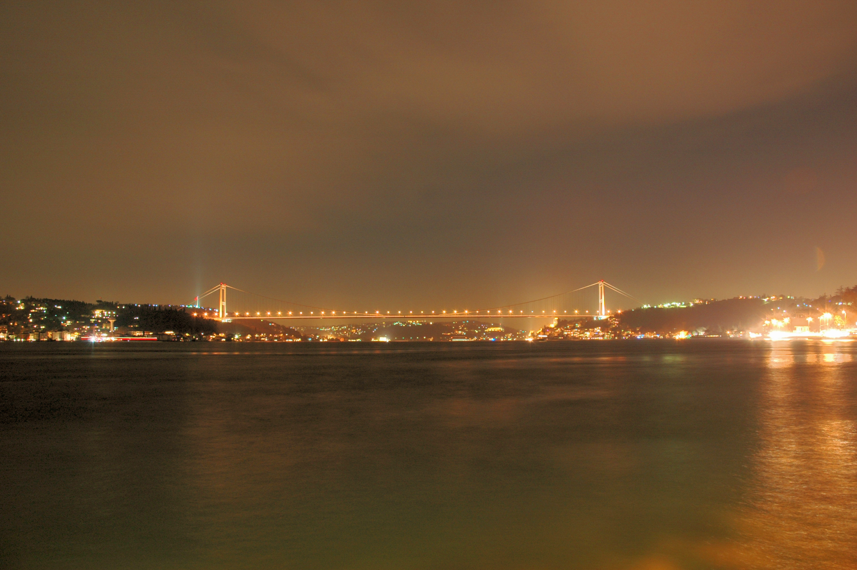 Fatih Sultan Mehmet Bridge at night, Istanbul, Turkey.